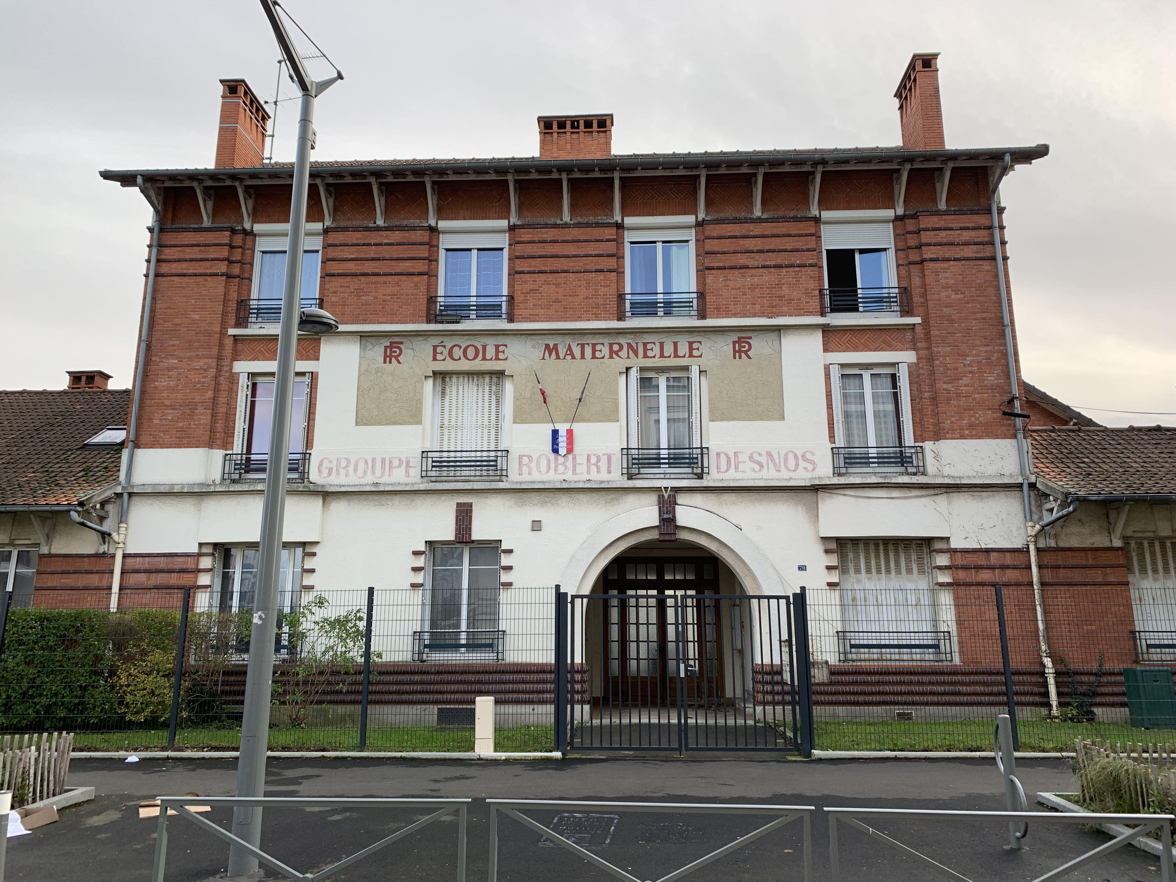 Groupe scolaire Robert Desnos, Noisy-le-Grand.